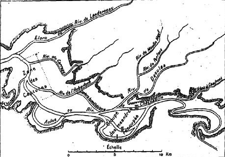 Les anciens méandres de l'Aulne sous la rade de Brest (submergés en raison du relèvement du niveau de la mer après la glaciation de Würm)